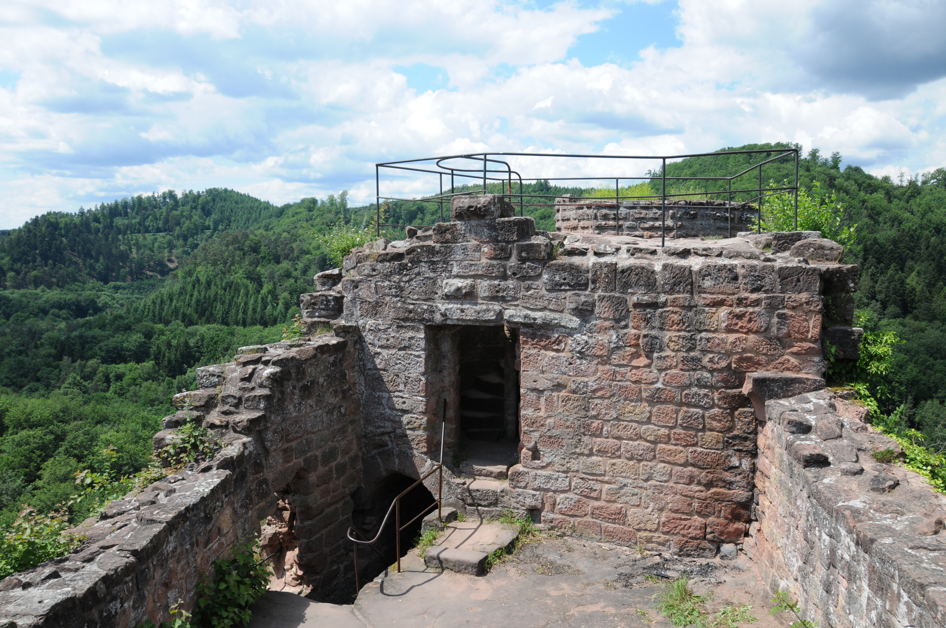 Aufgang und Schildmauer der Burg Groß Wasigenstein